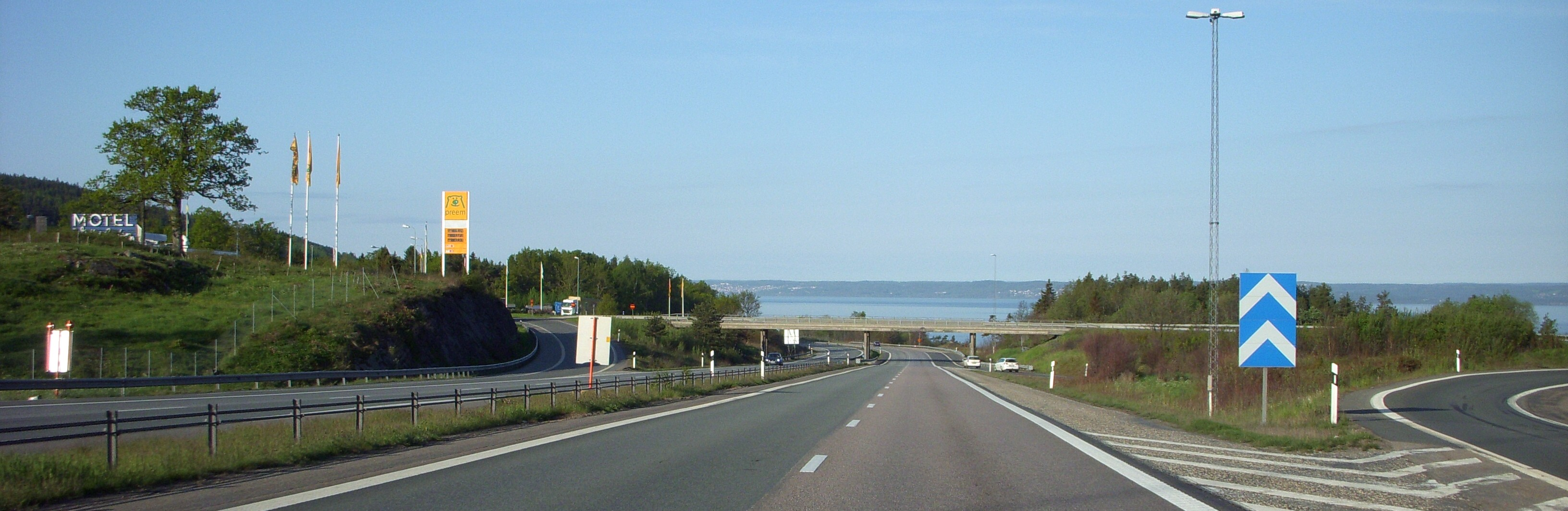 Vetterleden söderut i höjd med Preem, Vättersmålen